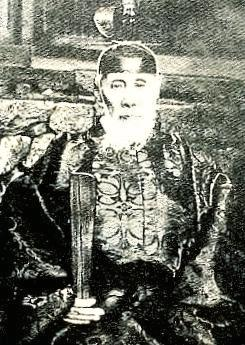 「敬神崇祖」の写真を加工